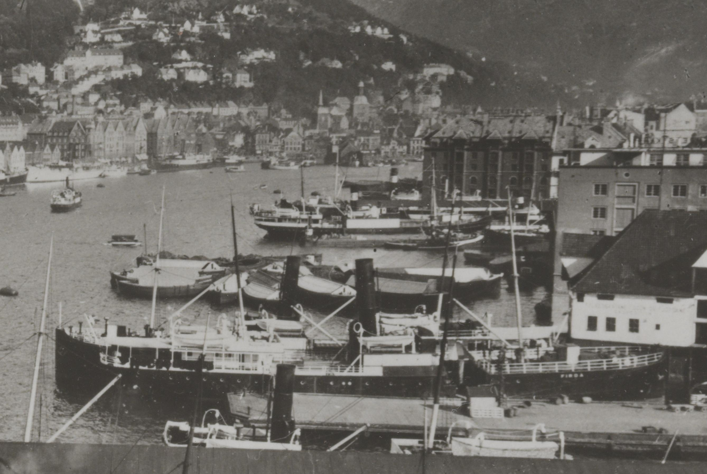 Bildet er hentet fra Nasjonalbibliotekets bildesamling Vågen, Bergen, Hordaland